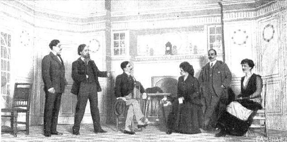 Escena de la comedia Lo que se llevan las horas, de Felipe Sasone, estrenada en el Teatro Infanta Isabel en 1916